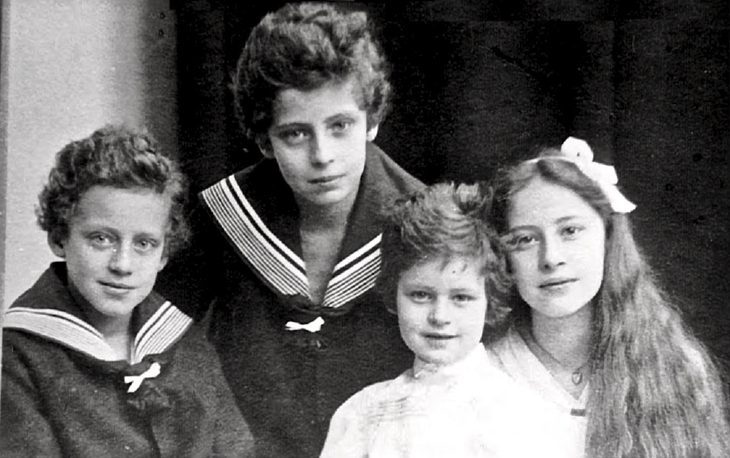 Die vier Kinder des deutschen Zauberkünstlers Conradi-Horster (1870–1944), von links: Waldemar, Hans, Horst (1903–1981) und Irma. Horst besuchte auf Veranlassung seiner Mutter von 1913 bis 1920 die reformpädagogische Freie Schulgemeinde Wickersdorf bei Saalfeld/Saale im Thüringer Wald.